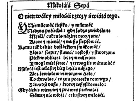 Strona z Rytmy abo wiersze polskie z 1601. Mikołaj Sęp Sarzyński.